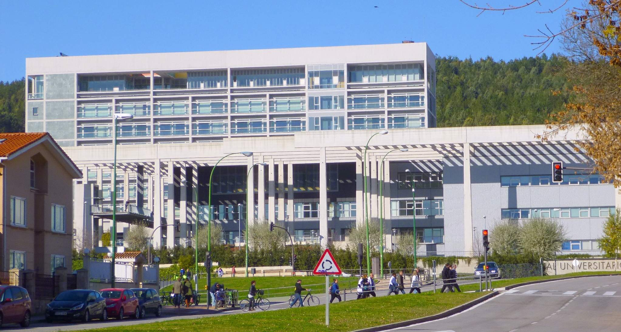 Burgos - Hospital Universitario